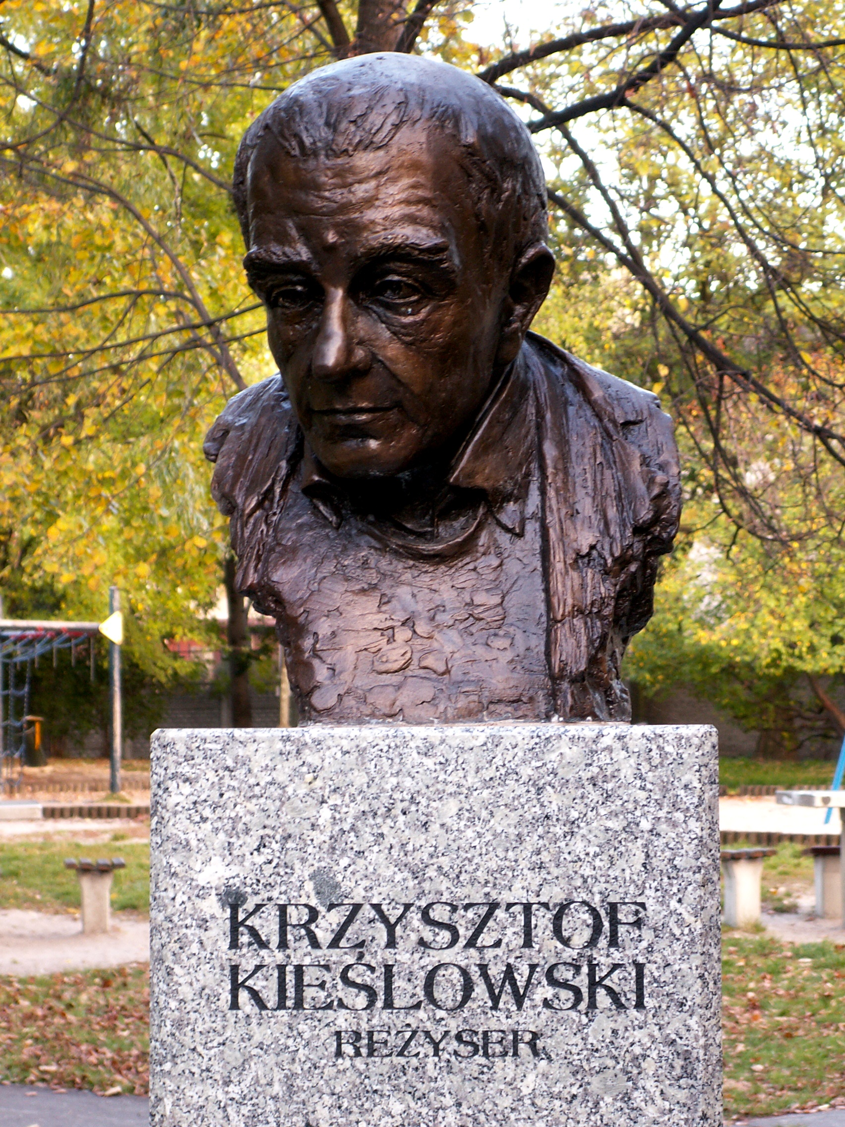 Bust of Krzysztof Kieślowski in Celebrity Alley in Kielce (Poland)